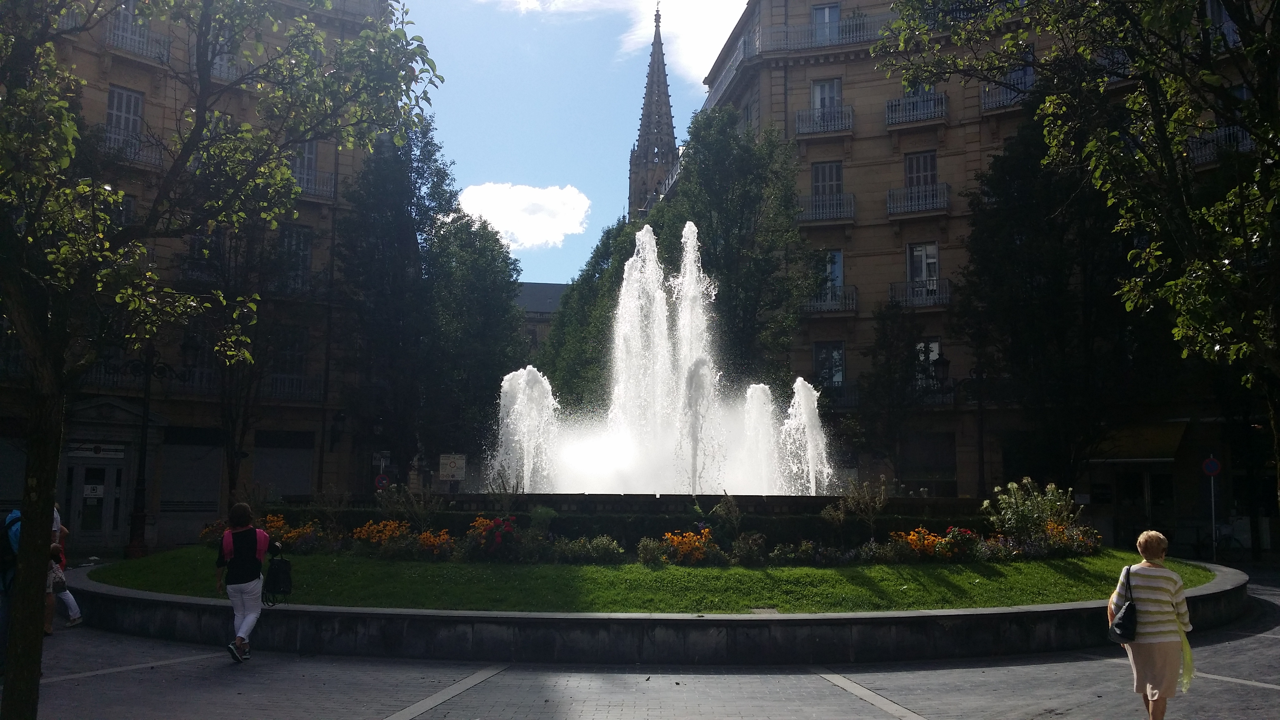 Bilbo plaza